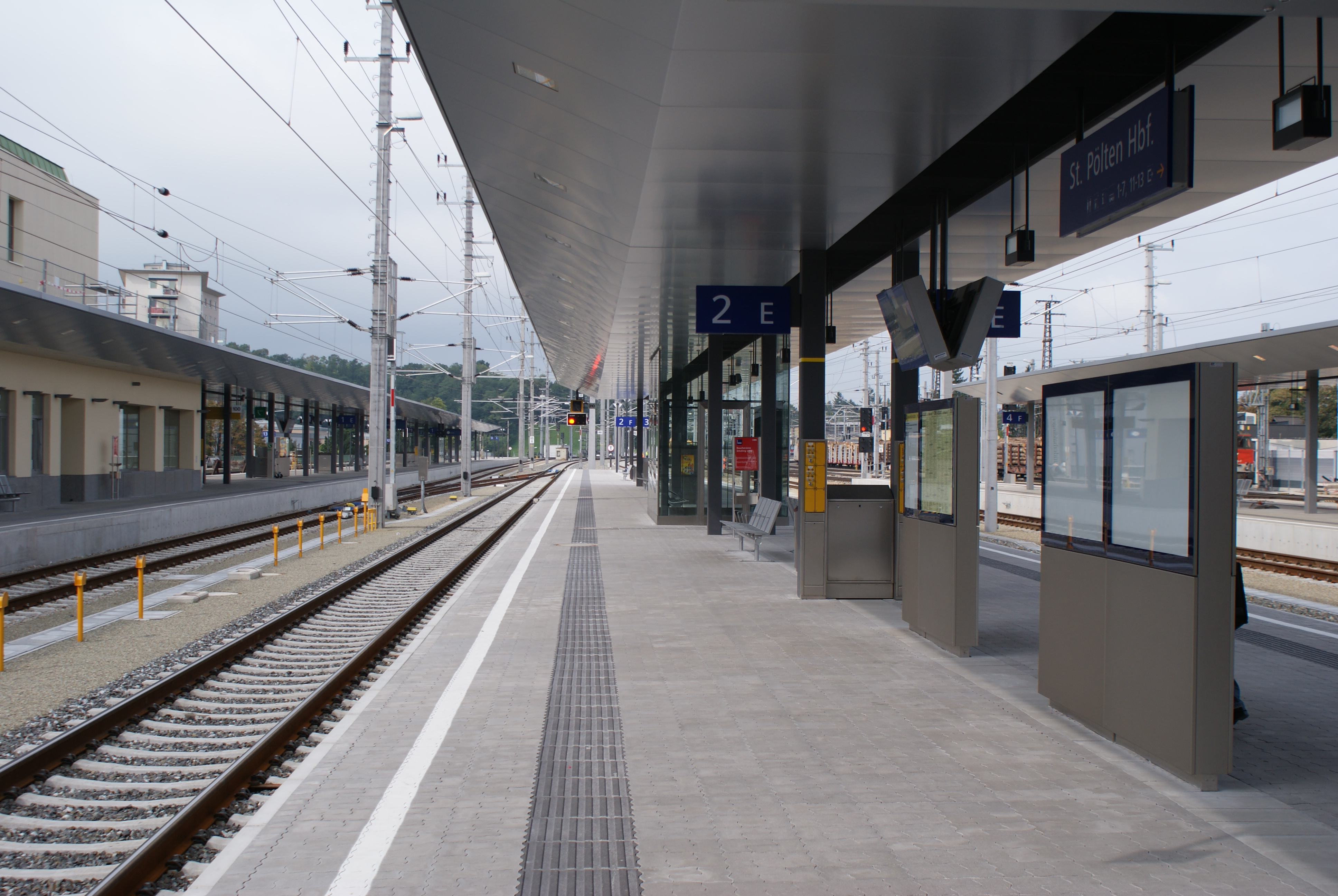 Der St. Pöltner Hauptbahnhof nach dem Umbau im September 2010